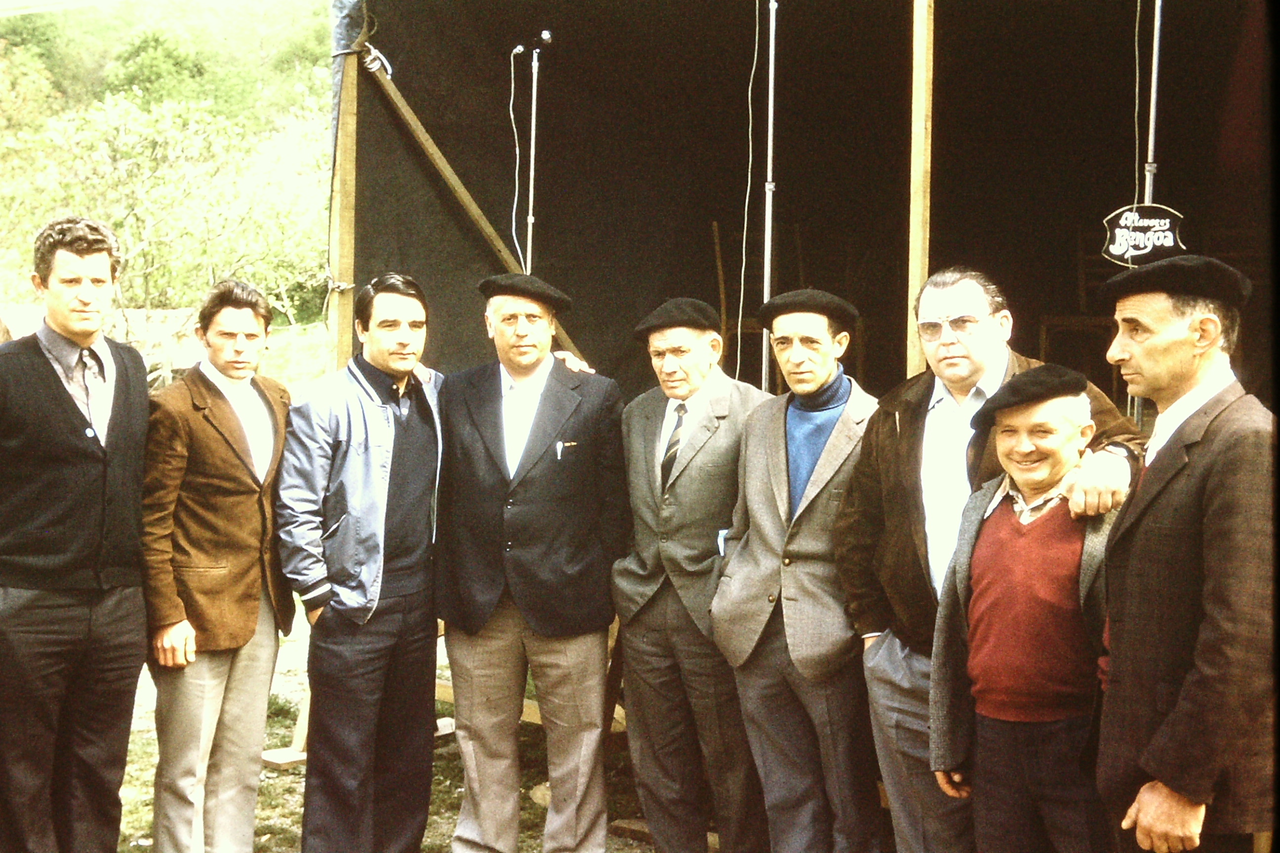 Bertsolariak 1970eko hamarkadan